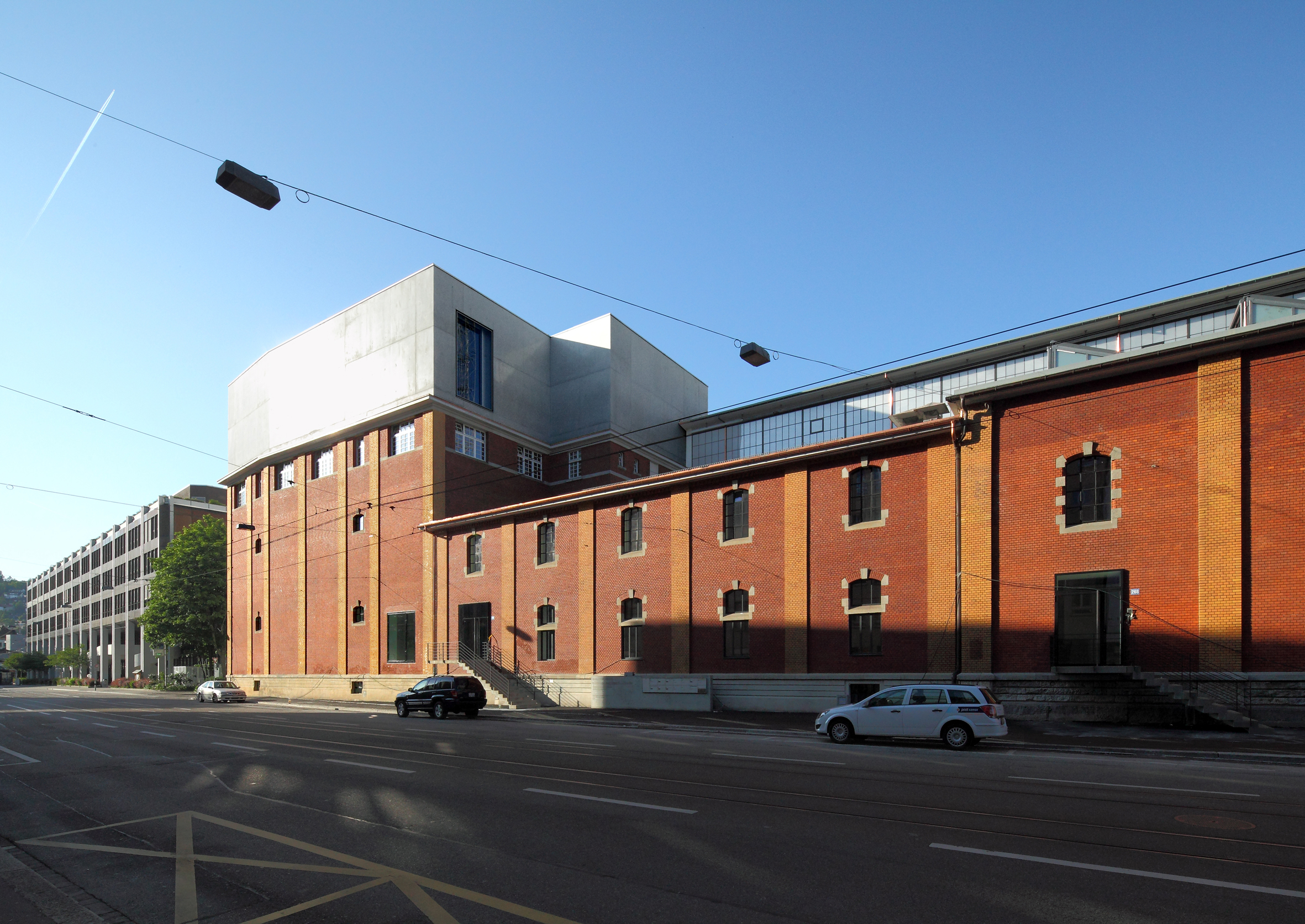 Löwenbräukunst-Areal (Foto: Thies Wachter) (2012)